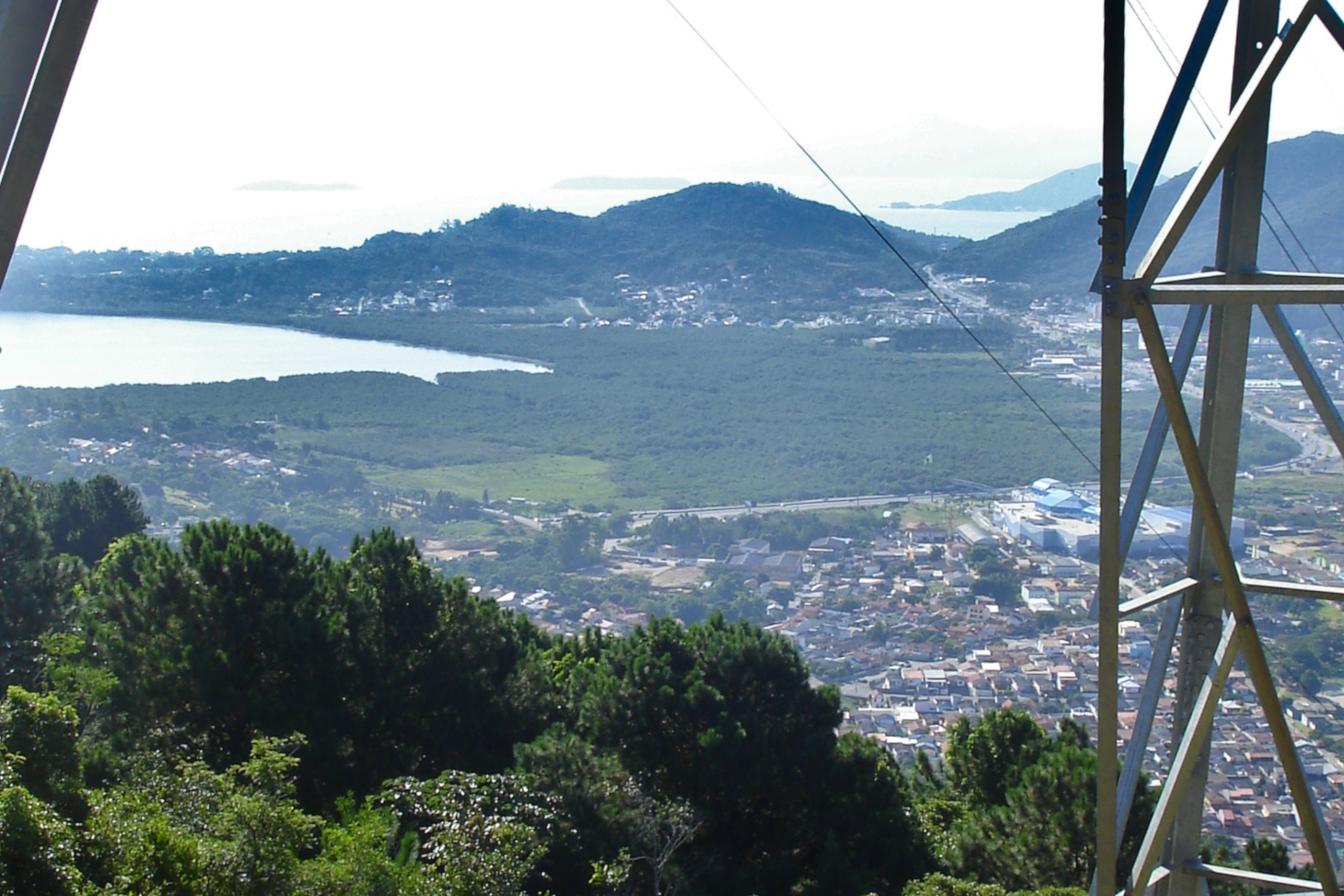 Destaque para área verde de manguezal, protegida pela Estação Ecológica de Carijós, no Bairro Saco Grande em Florianópolis, sul do Brasil. Foto de 2009.